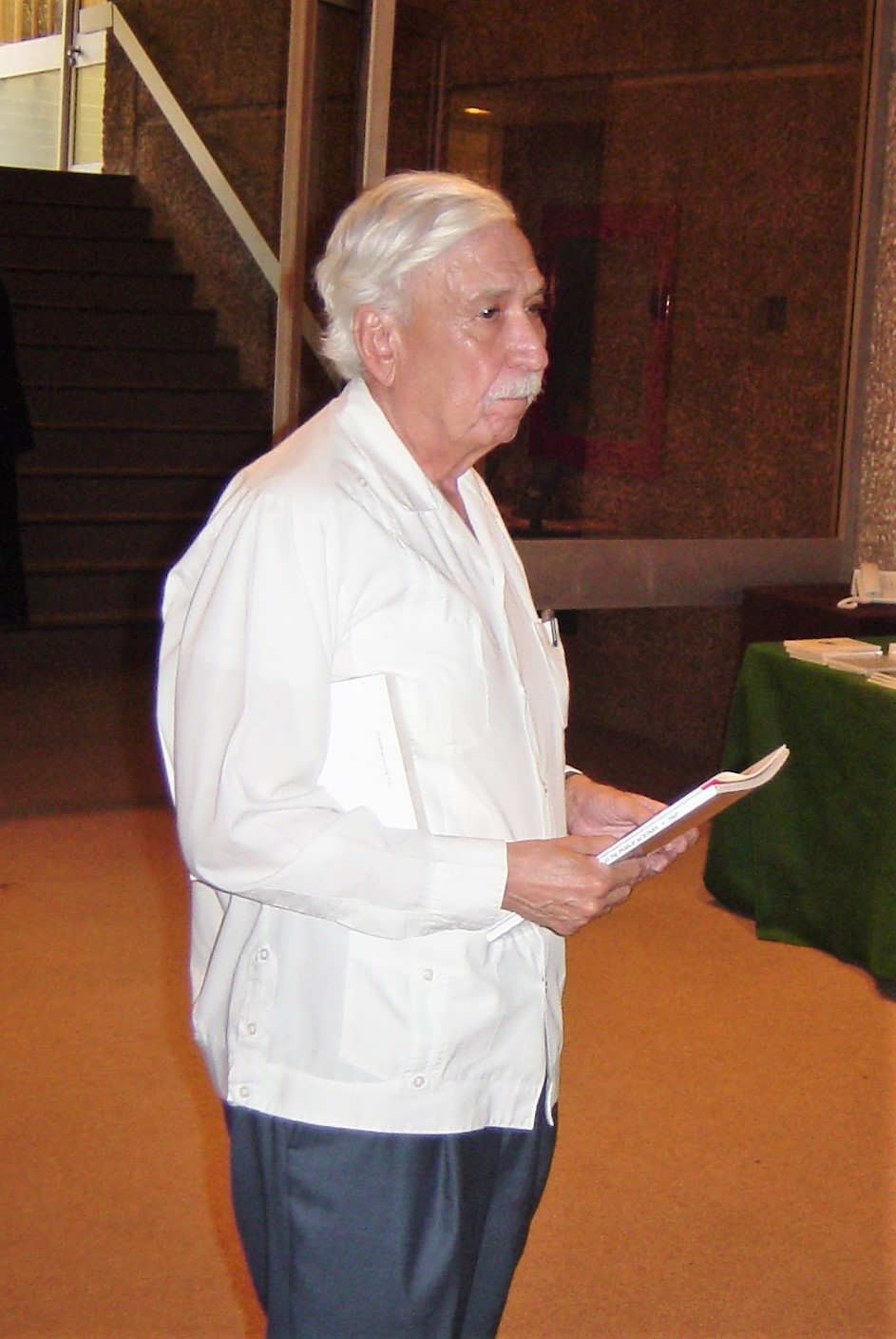 Ario Garza Mercado, bibliotecólogo, abogado, ensayista y poeta mexicano.